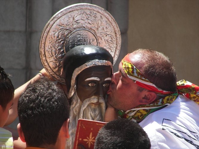 Festa di San Calogero ad Agrigento: un devoto bacia la statua del santo durante la processione.